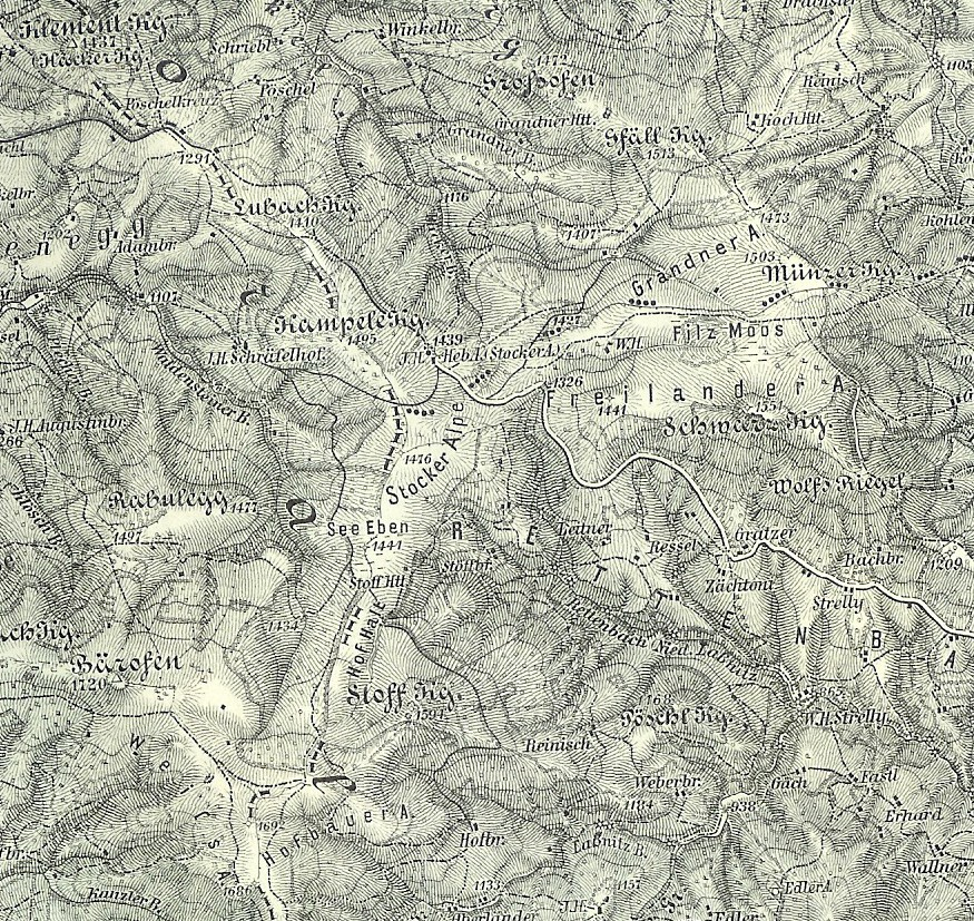 Das Gebiet der heutigen Hebalm ca. 1930: Weißalm/Hofbauer Alm, Hofhalt, Stockeralm, Freiländer Alm, Grandner Alm, mit Filzmoos und See Eben